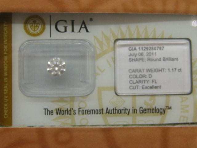 最高級ダイヤモンド